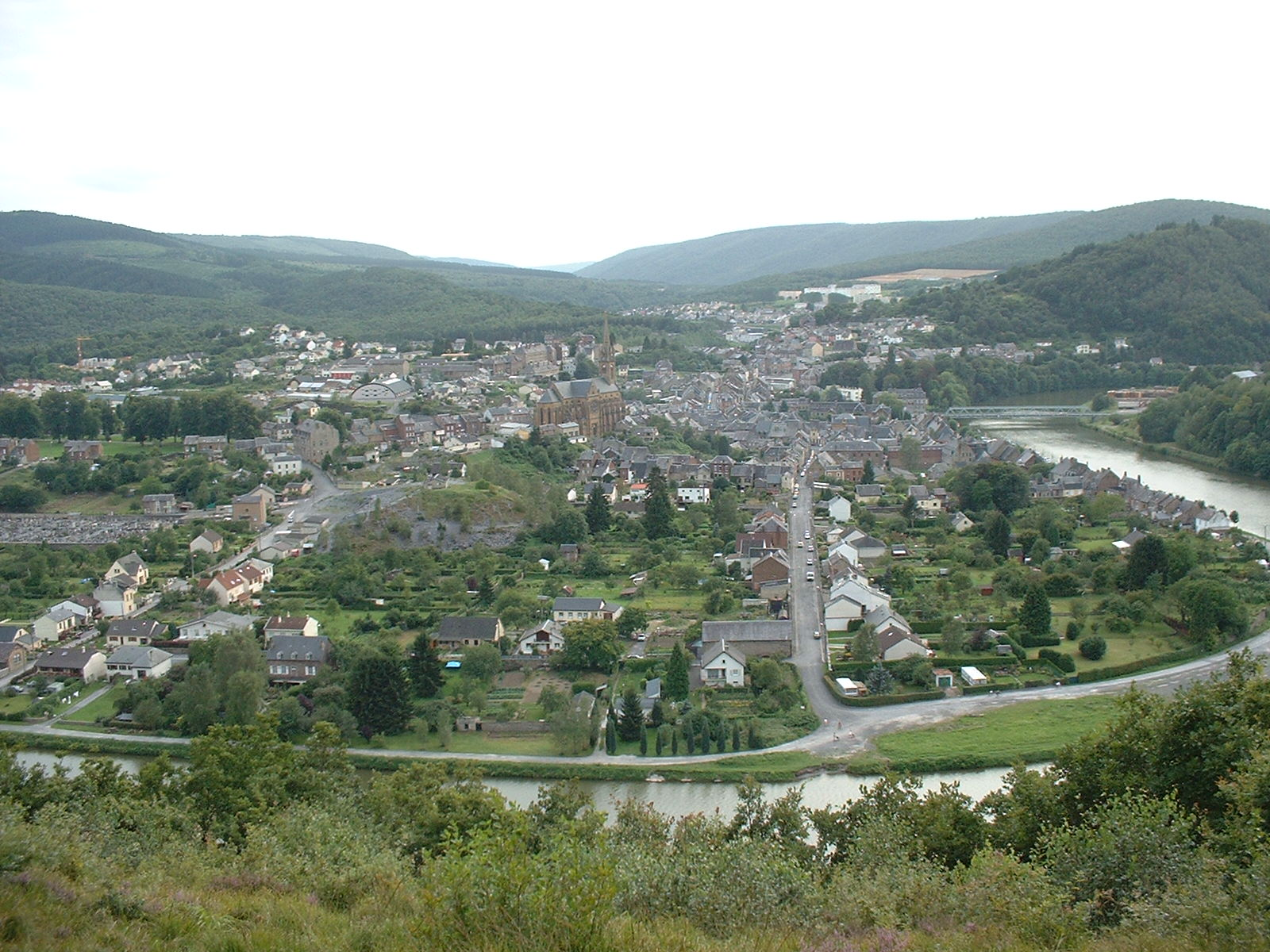 Image du village de Fumay, dans les Ardennes en France. Picture of Fumay town, in France. author : tatoute